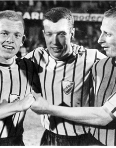 Leif Skiöld